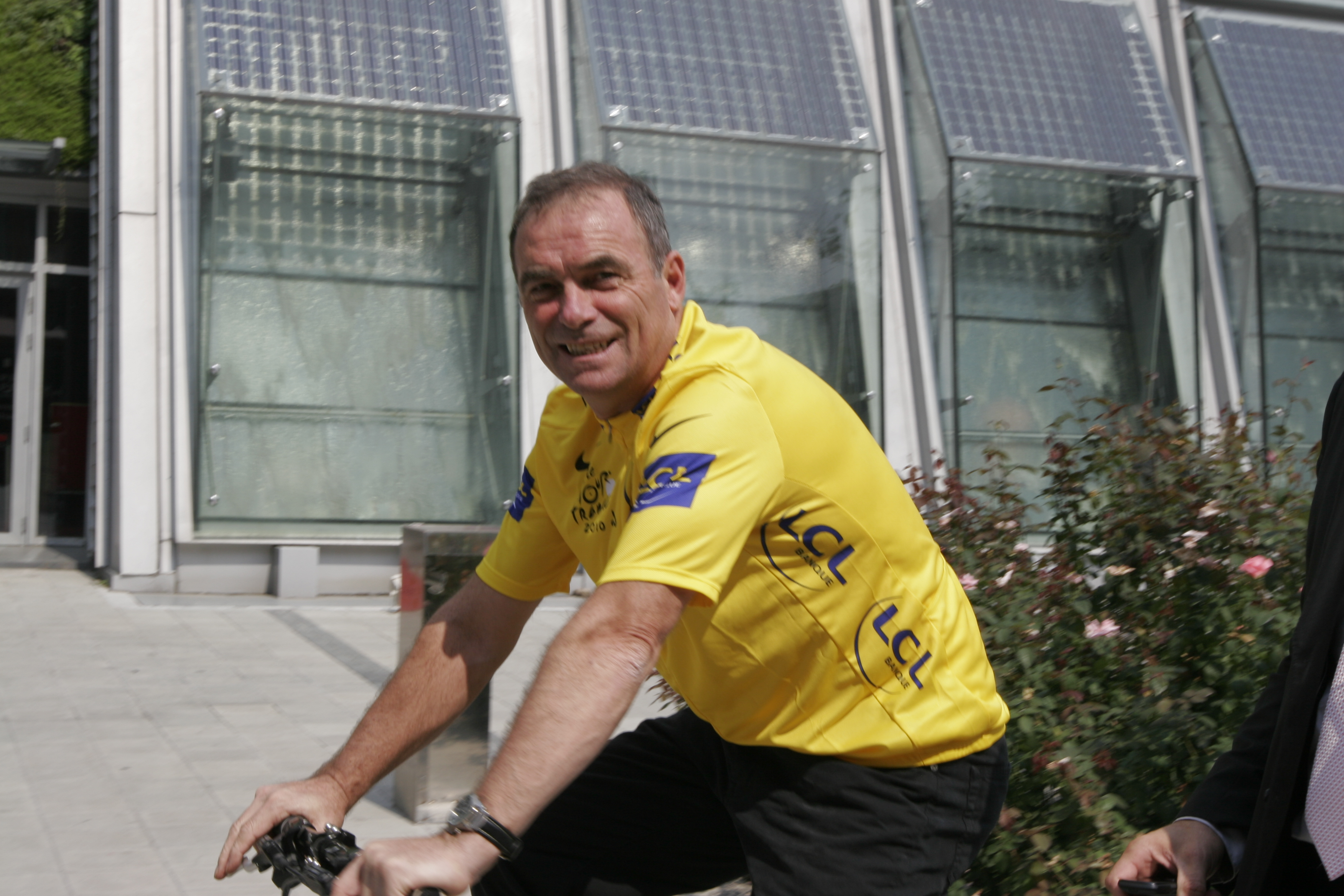 Exposition Universelle Bernard Hinault